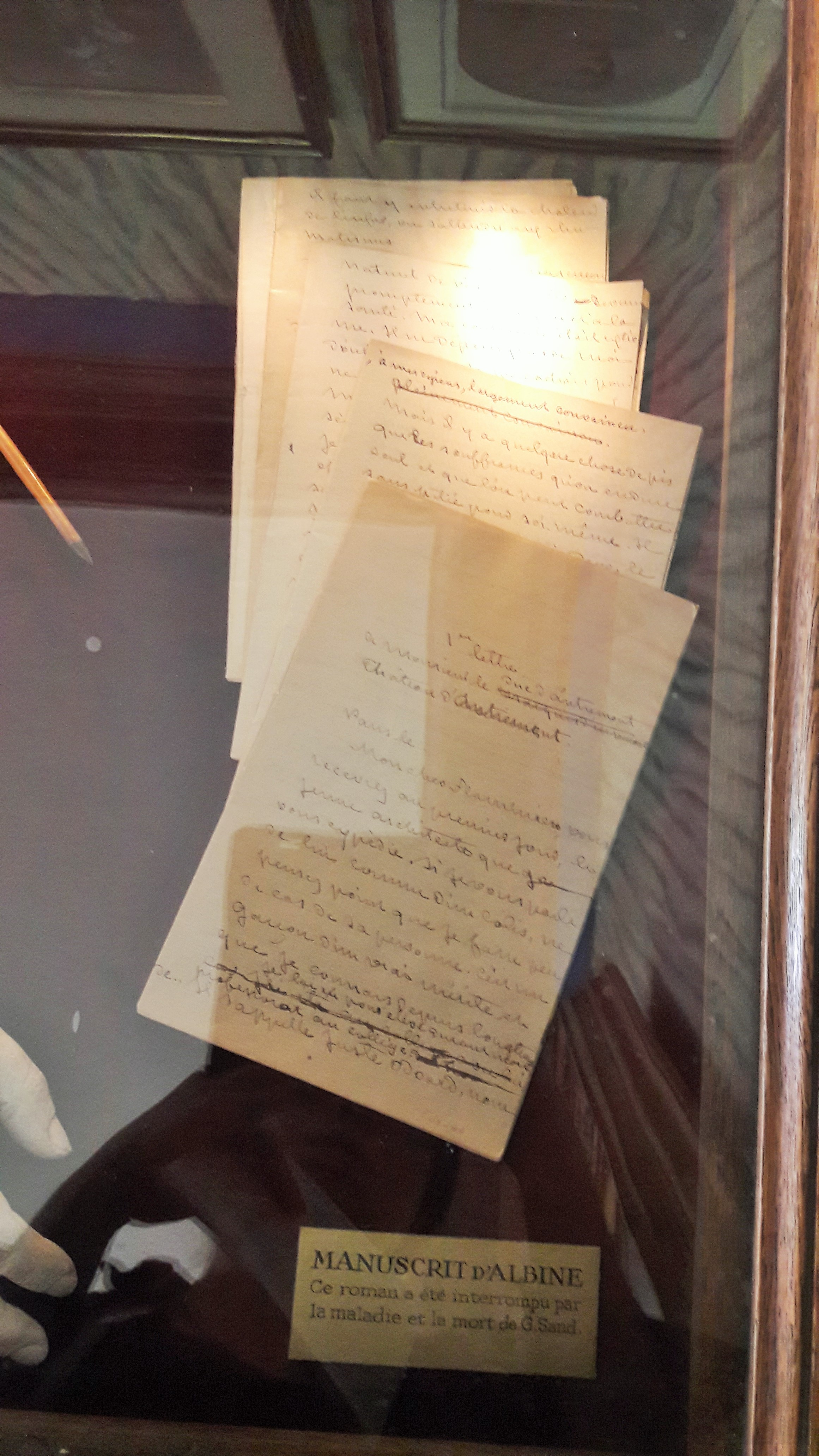 Manuscrit d' Albine, dernier roman inachevé de George Sand (commencé en 1876, publié à titre posthume en mars-avril 1881 dans "La Nouvelle Revue", tome n°9). Musée de la Vie romantique, Paris (France).